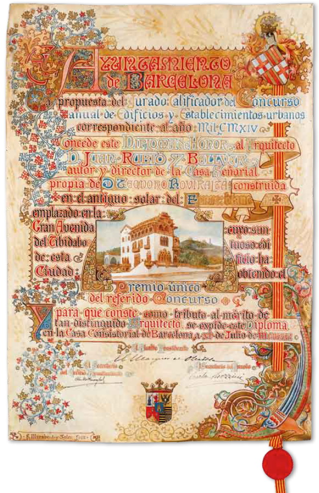 Diploma als premiats en el Concurs Anual d'Edificis Artístics de l'Ajuntament de Barcelona. En aquest cas el lliurat per la casa de Teodor Roviralta (any 1914)